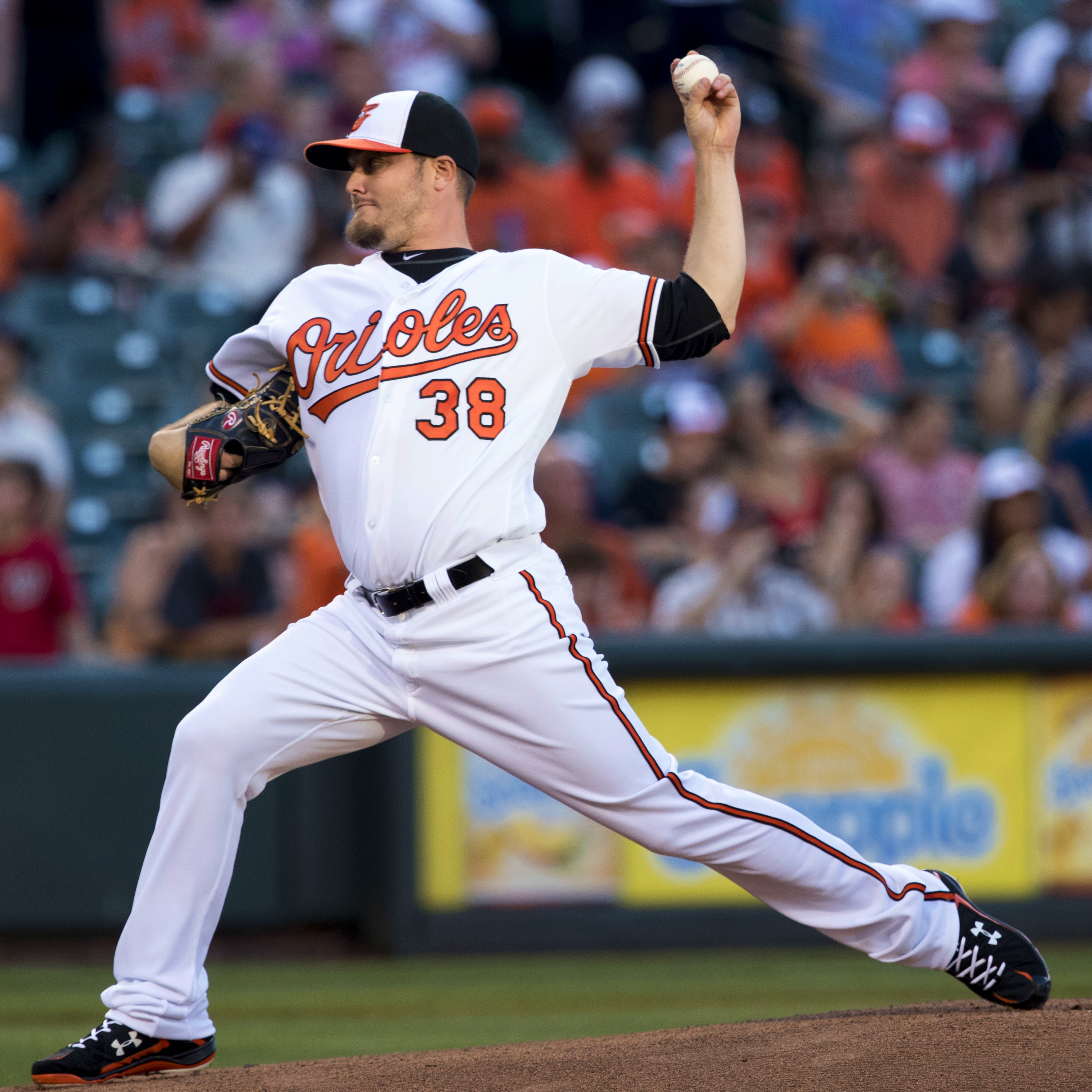 Wade Miley